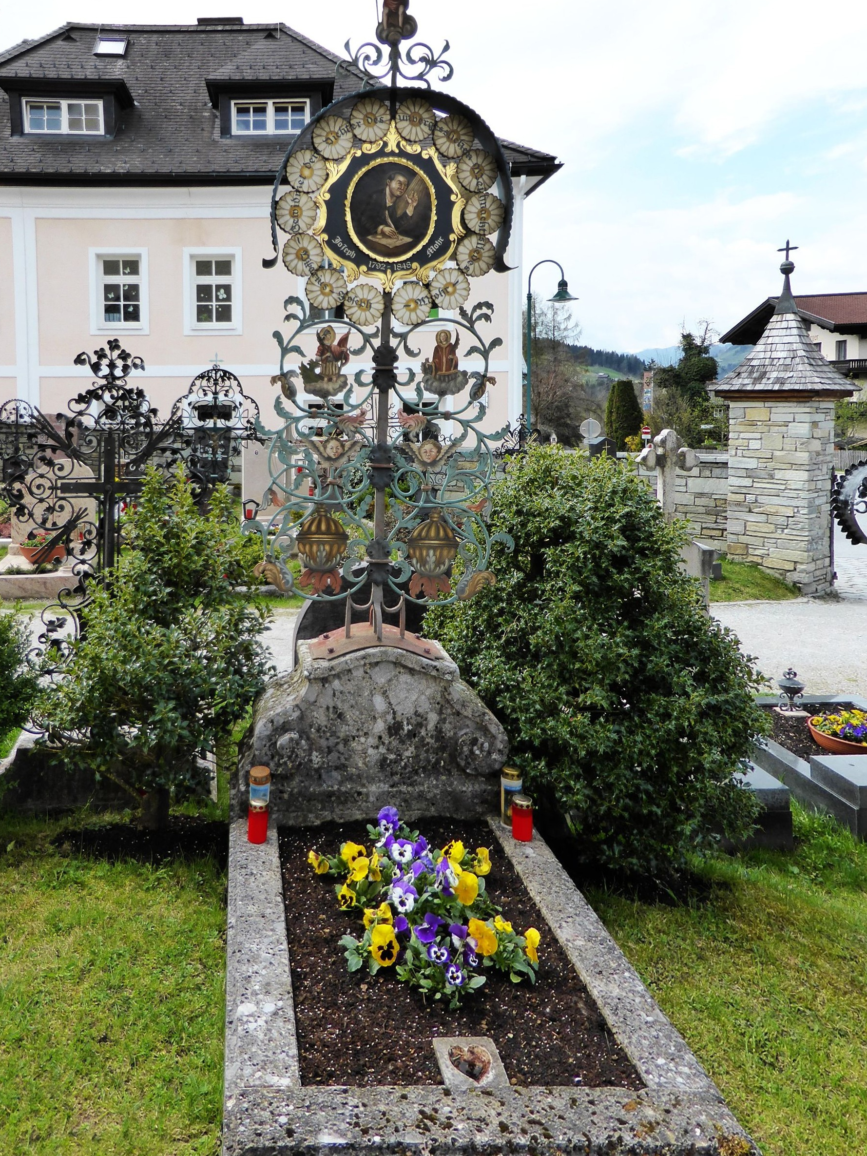 Friedhof